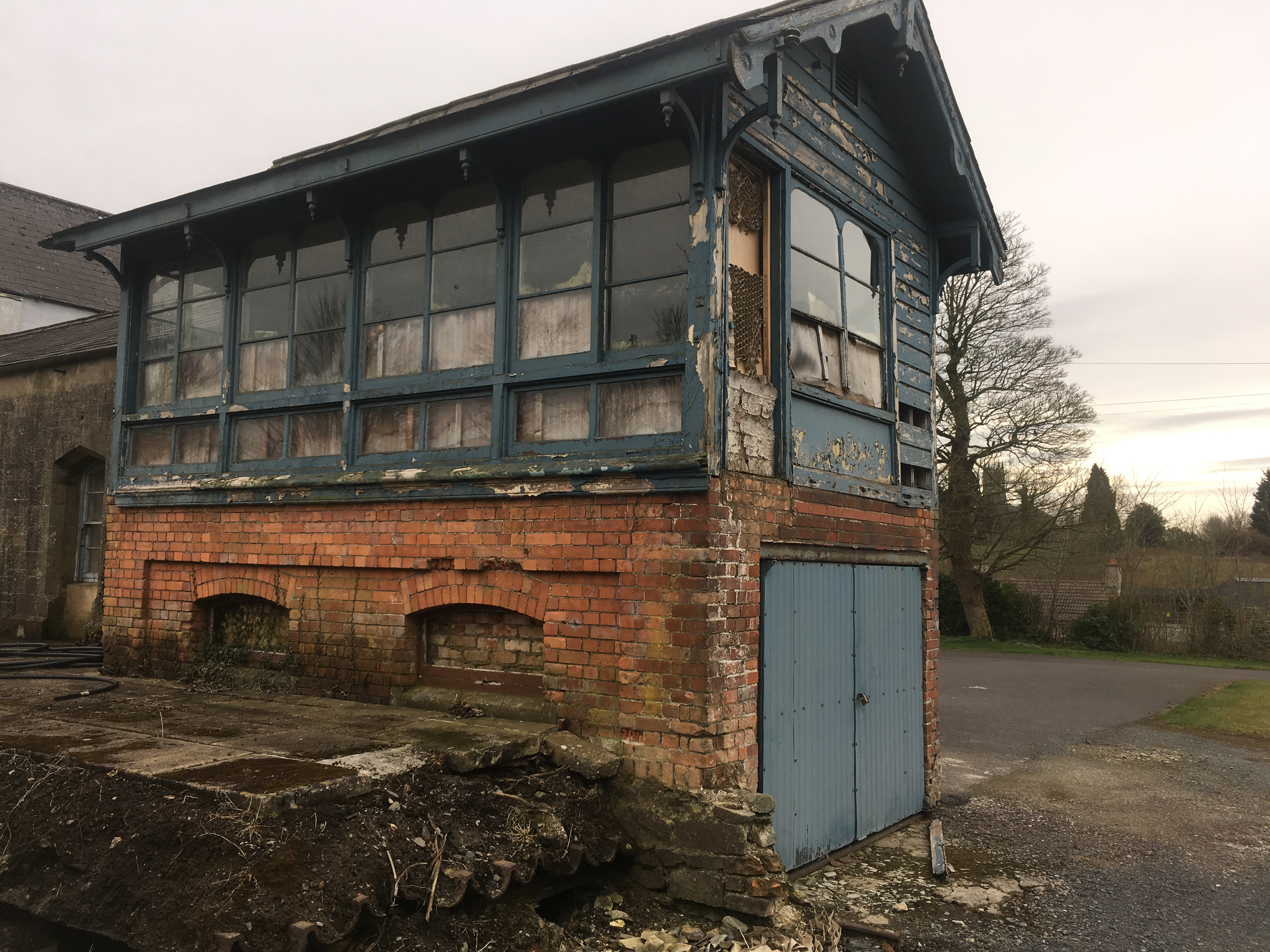 Cuid de theach an stáisiúin